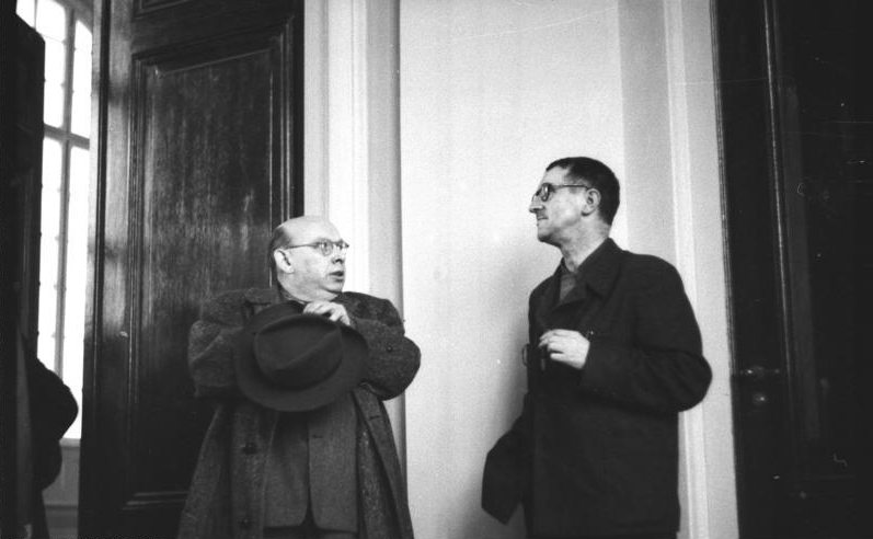 Berlin, Bertold Brecht und Hanns Eisler Berlin Sitzung des vorbereitenden Ausschusses der Akademie der Künste der DDR, am 21.03.1950 an der der Schriftsteller, Dichter und Regisseur Bertold Brecht (rechts) und der Komponist Hanns Eisler teilnahm. U.B.z.: den Dichter und Regisseur Bertolt Brecht und den Komponisten Hanns Eisler. Abgebildete Personen: Brecht, Bertolt: : Schriftsteller, Regisseur, DDR (GND 118514768) Eisler, Hanns: Komponist, DDR (GND 118529692)